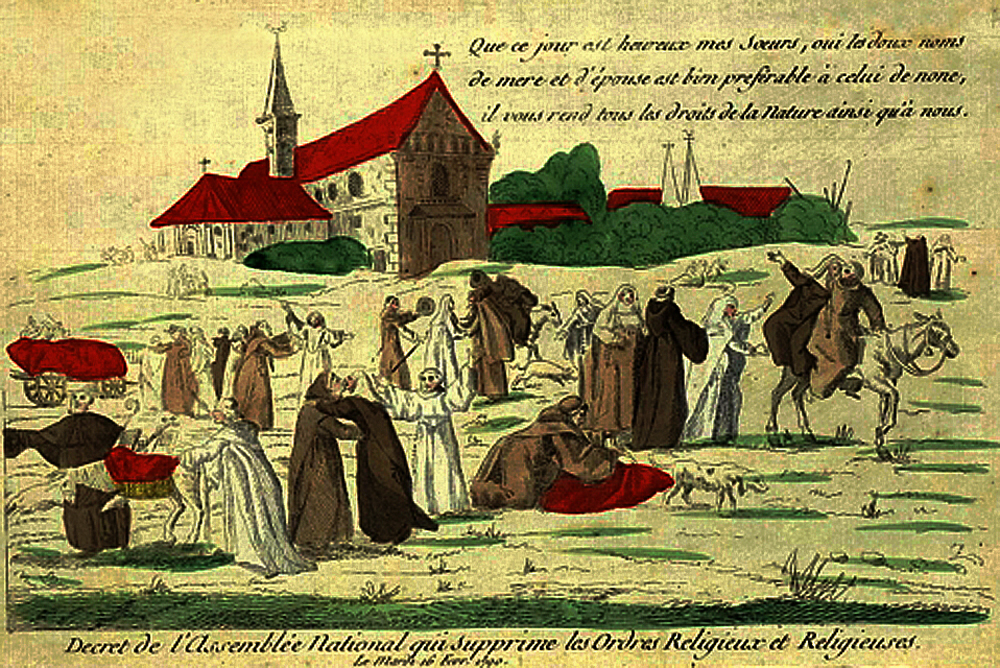 Décret de l'Assemblée nationale supprimant les ordres religieux